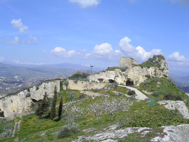 Veduta panoramica del parco urbano di Assoro (EN)